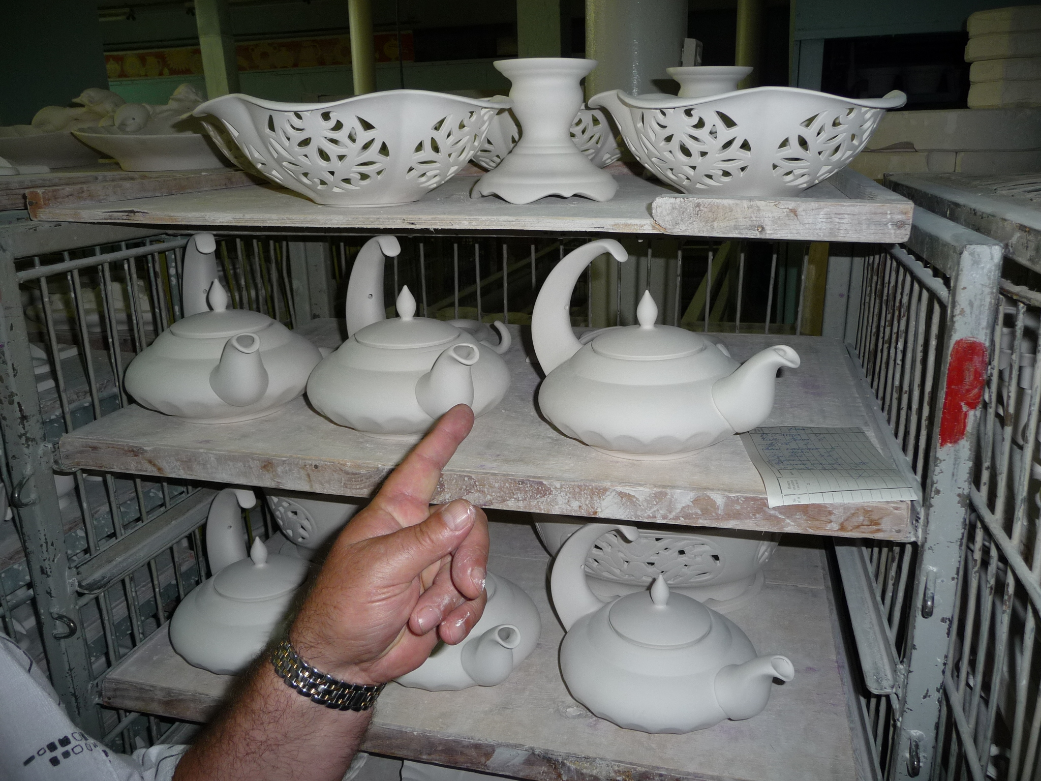 MoscowRegion-Gzhel-p1030265.jpg